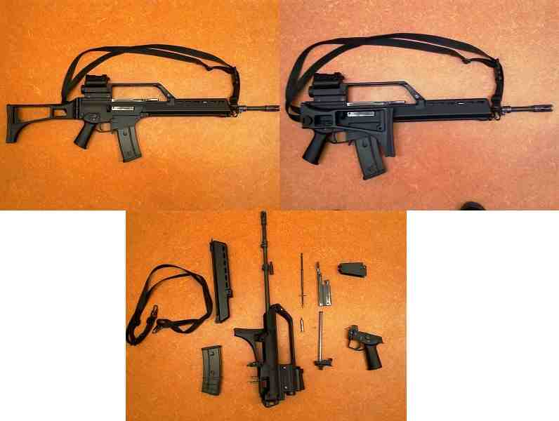 G36 zusammengesetzt, abgeklappte Schulterstütze und zerlegt